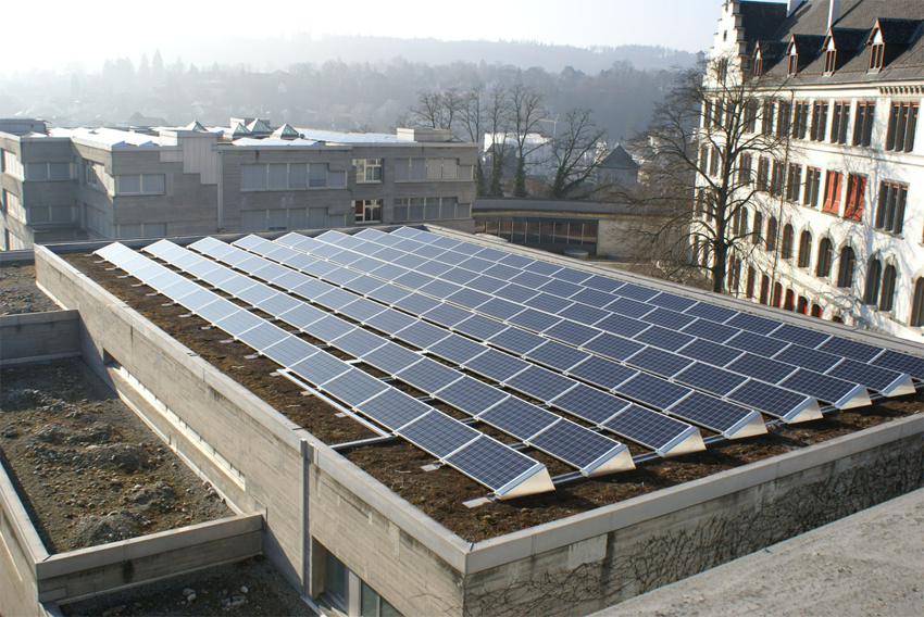 Ein Teil der Photovoltaik-Anlage auf dem Dach der Kantonsschule Schaffhausen